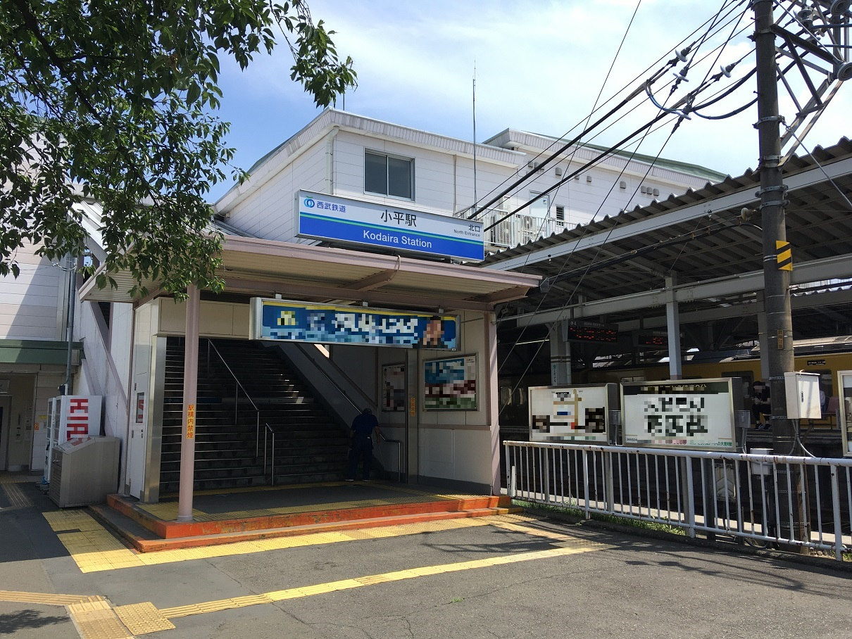 小平駅北口